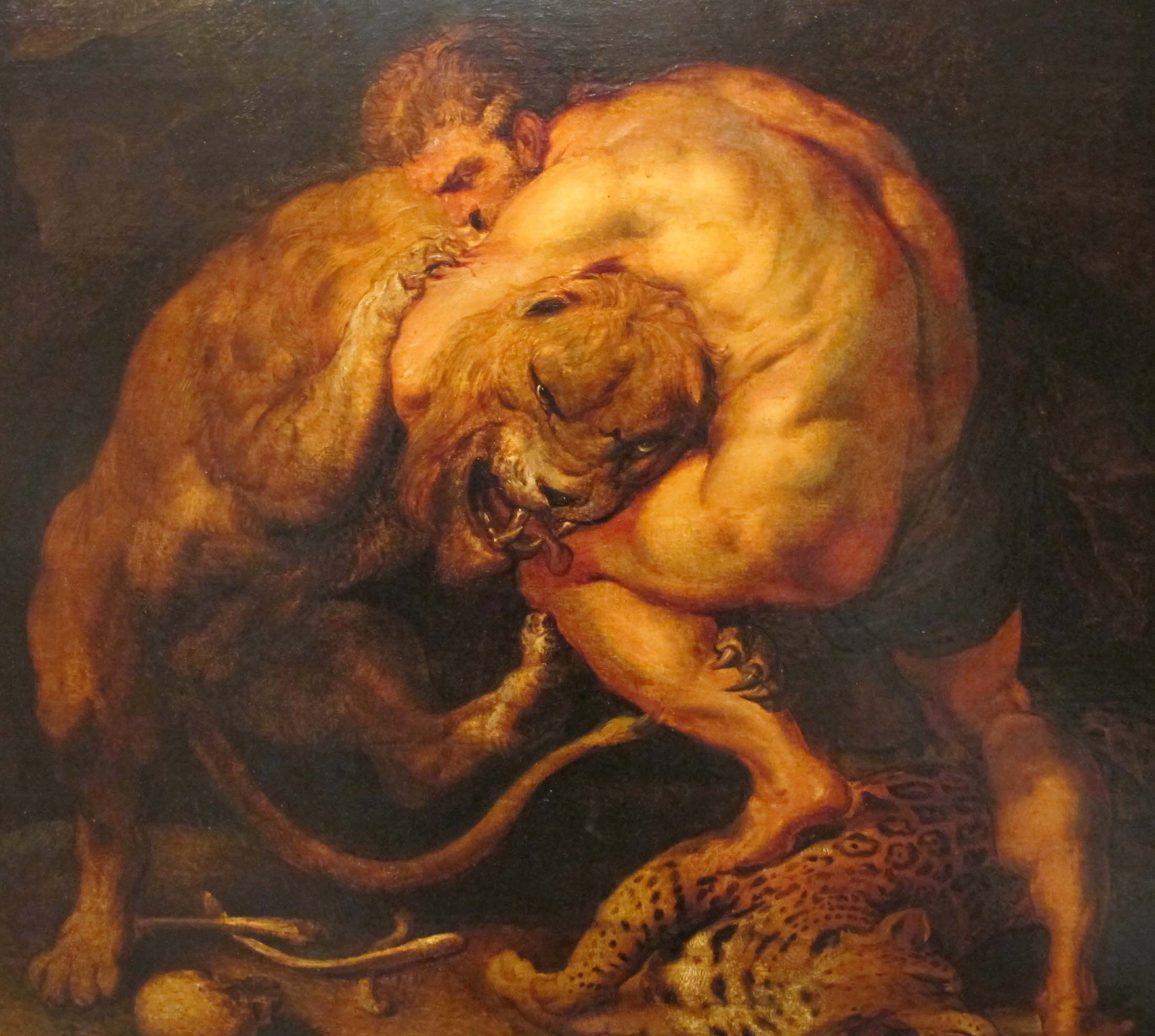 Pieter paul rubens, ercole e i leone nemeo